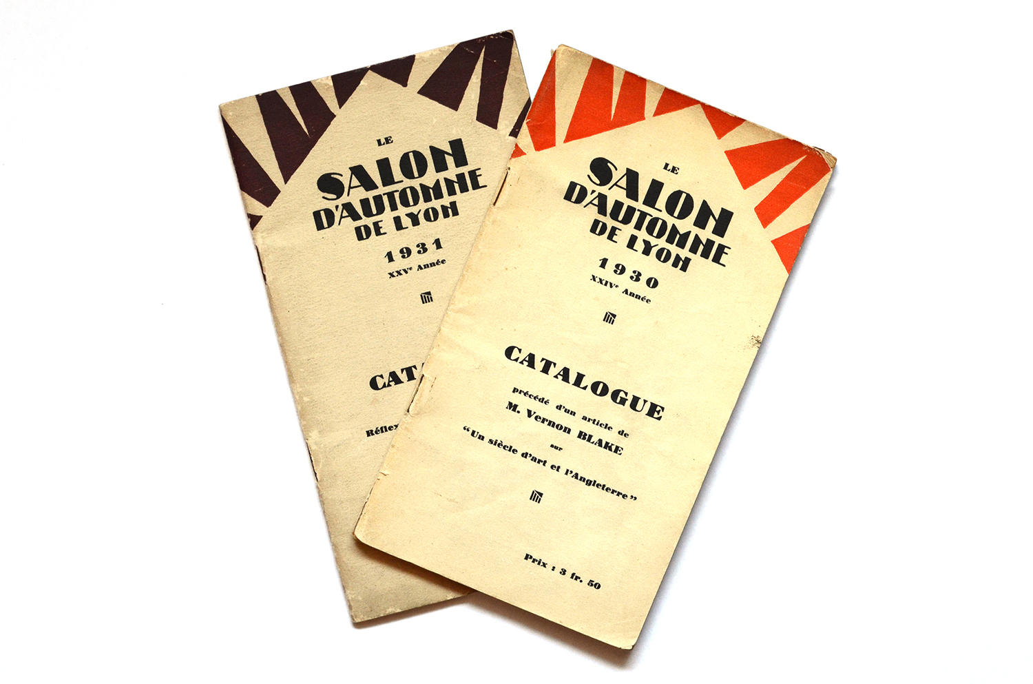 Catalogue du Salon d'automne de Lyon, 1930 et 1931